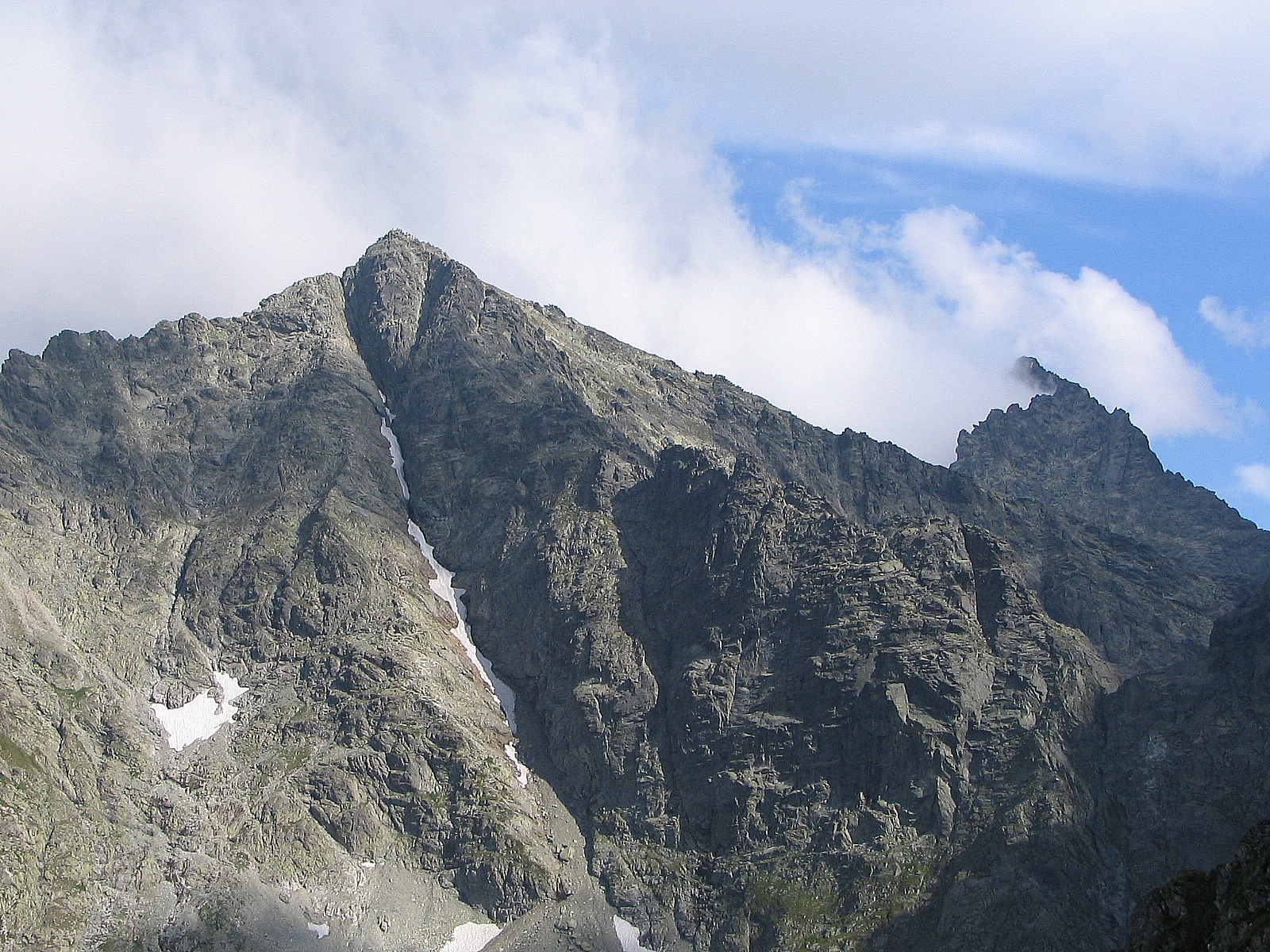 Widok na Rysy ze szlaku na Mięguszowiecką Przełęcz pod Chłopkiem